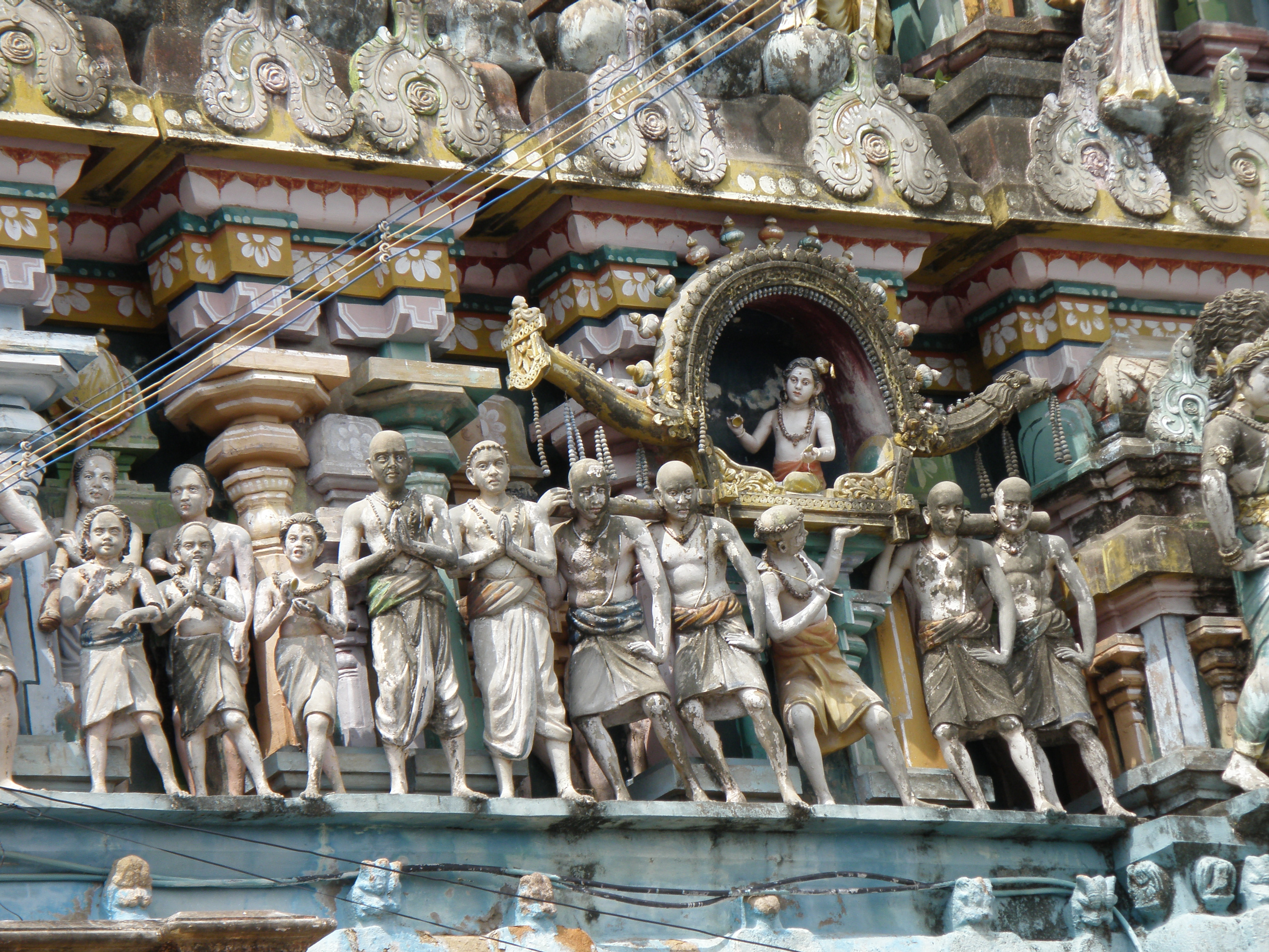 அப்பரடிகள் சிற்பம், திருக்கடையூர் கோபுரம்